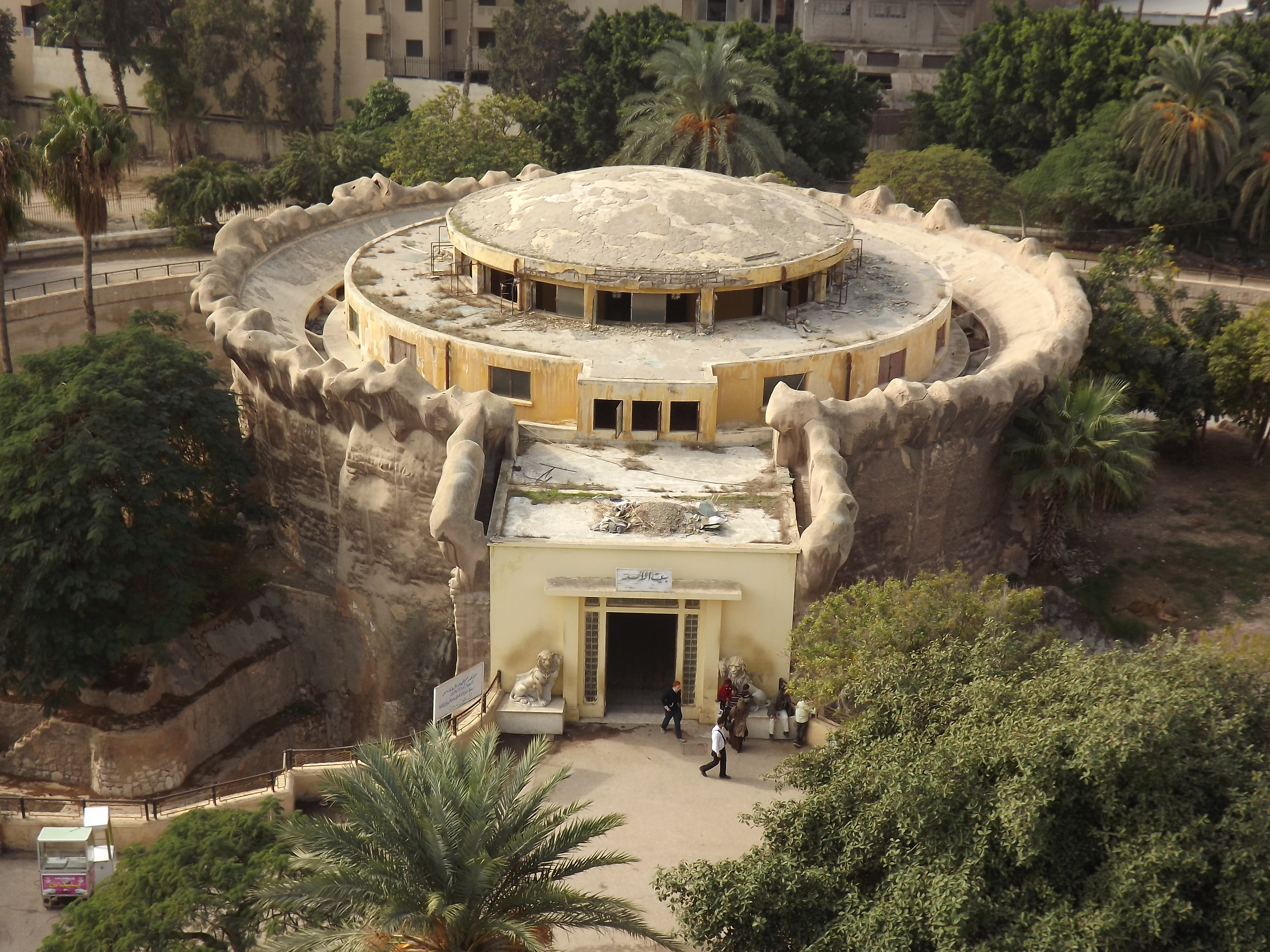 حديقة حيوان النزهة - الاسكندرية